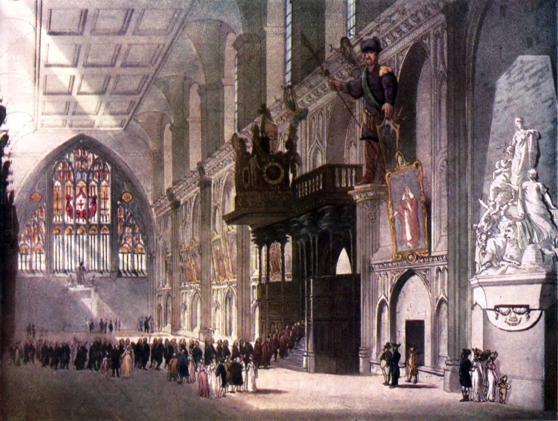 Guildhall